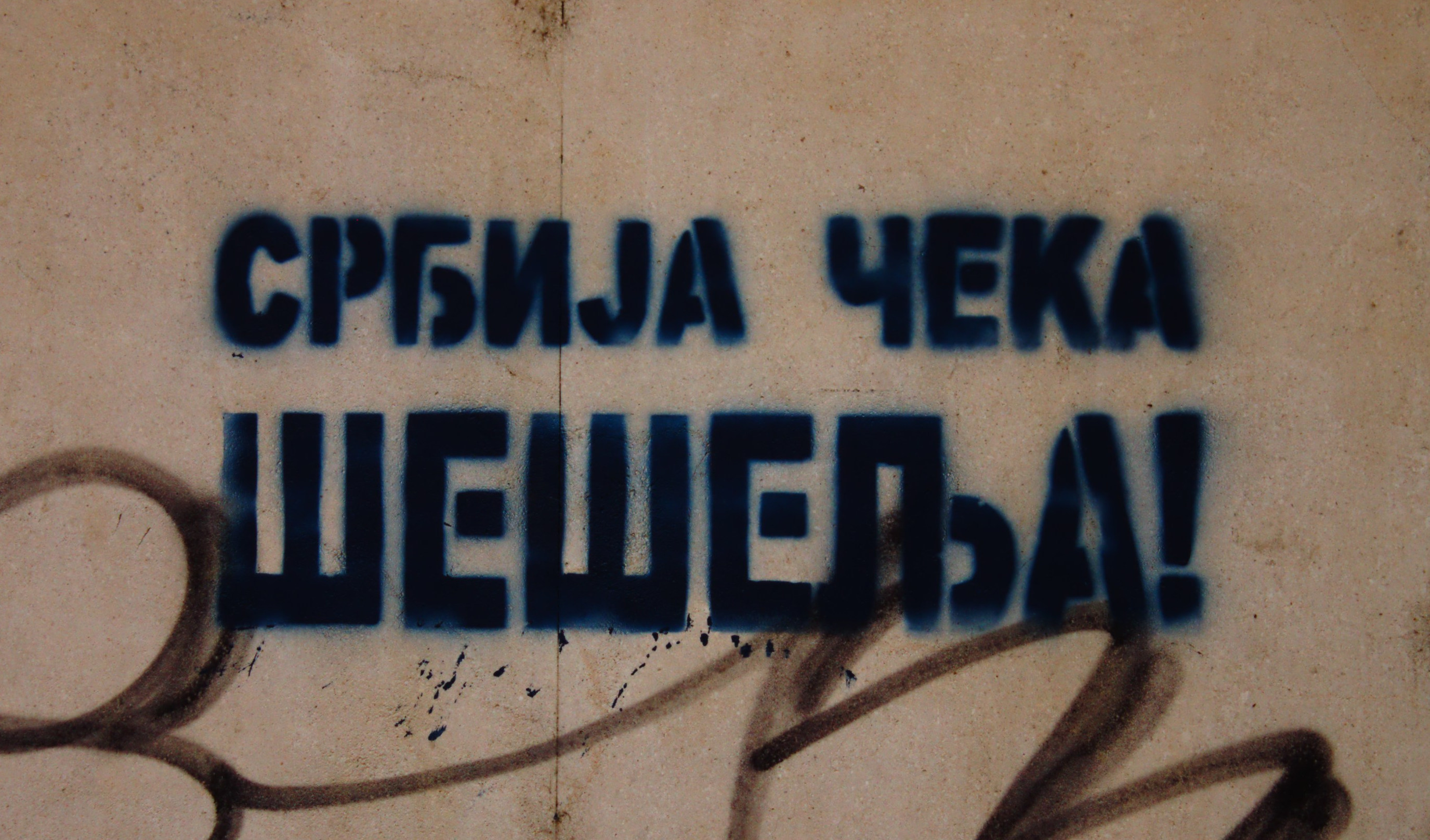 Grafit u Novom Sadu.